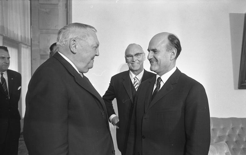 Bundeskanzler Klaus (Österreich) bei Bundeskanzler Erhard